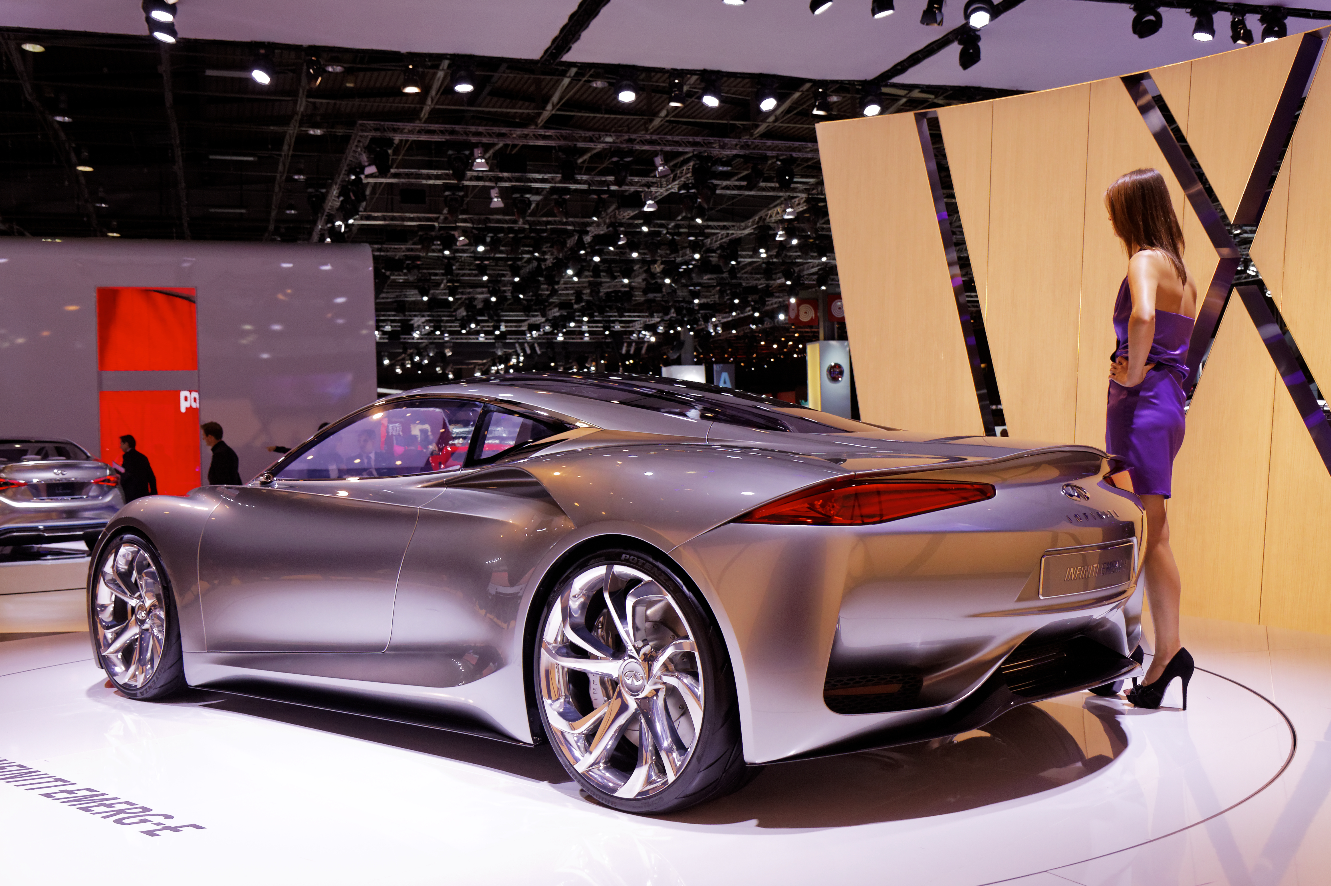 L'infiniti Emerg-e présentée lors du Mondial de l'Automobile de Paris 2012.